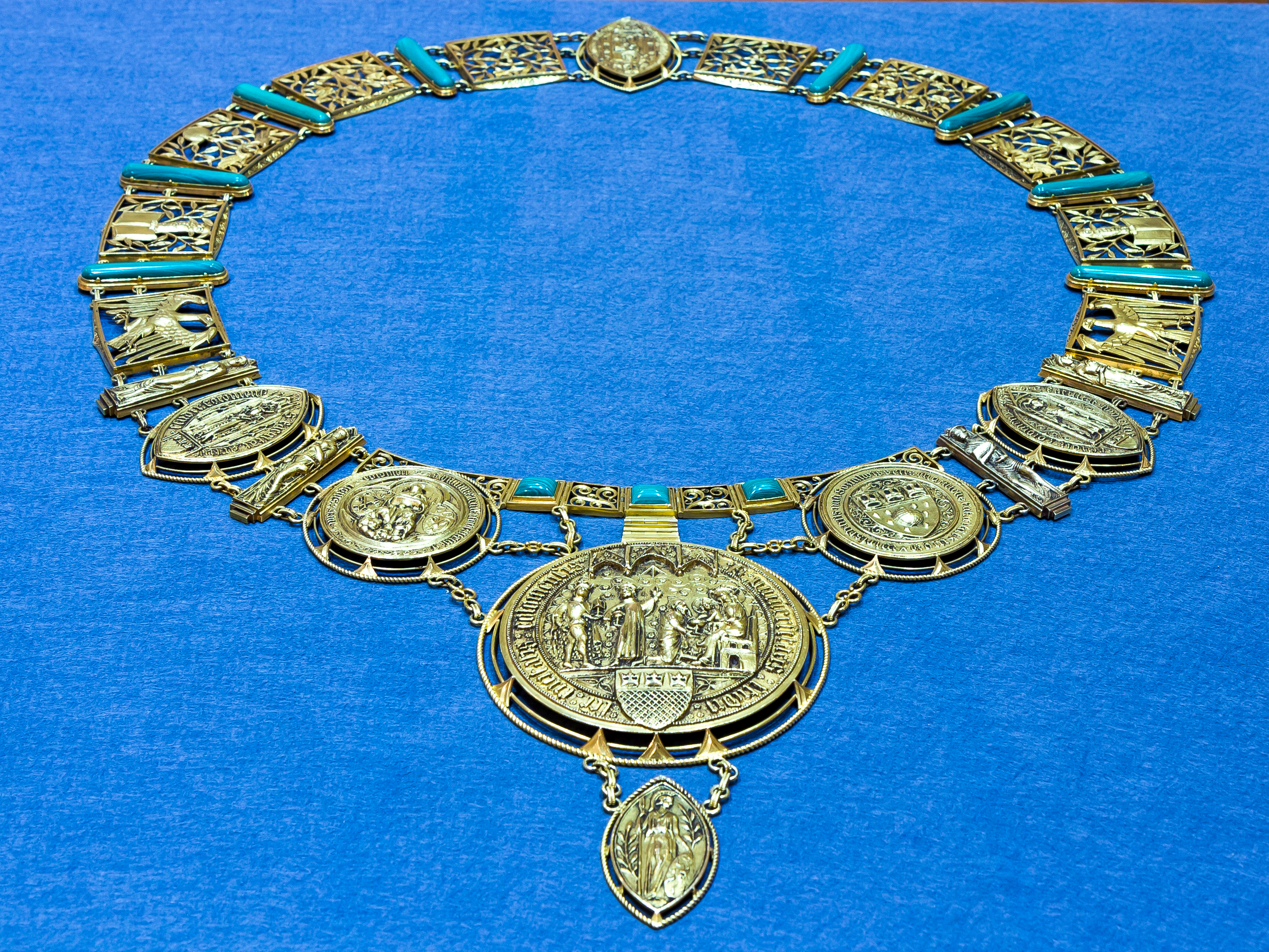 Amtskette des Rektors der Universität zu Köln